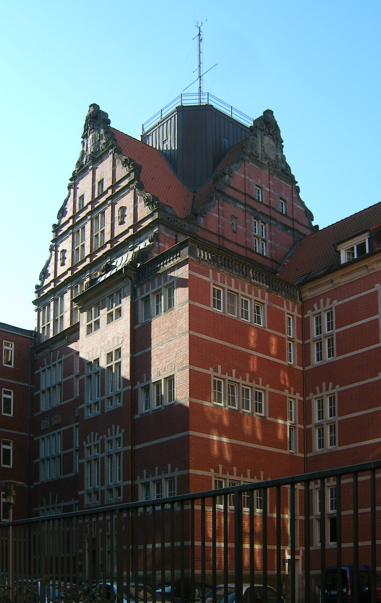 Bildbeschreibung: Hamburg, St. Pauli, Bundesamt für Seeschifffahrt und Hydrographie Fotograf: selbst Datum: 19.07.2006